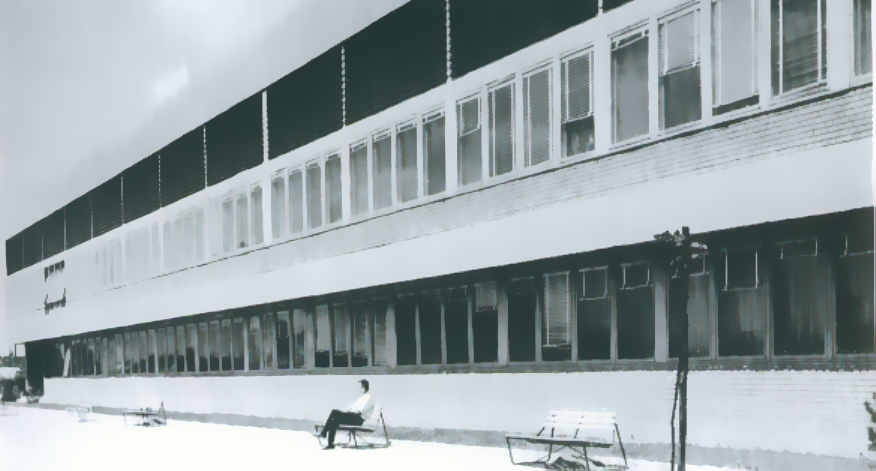 Nagyothallók Állami Intézete. Budapest, XIV. Rákospatak u. 101.